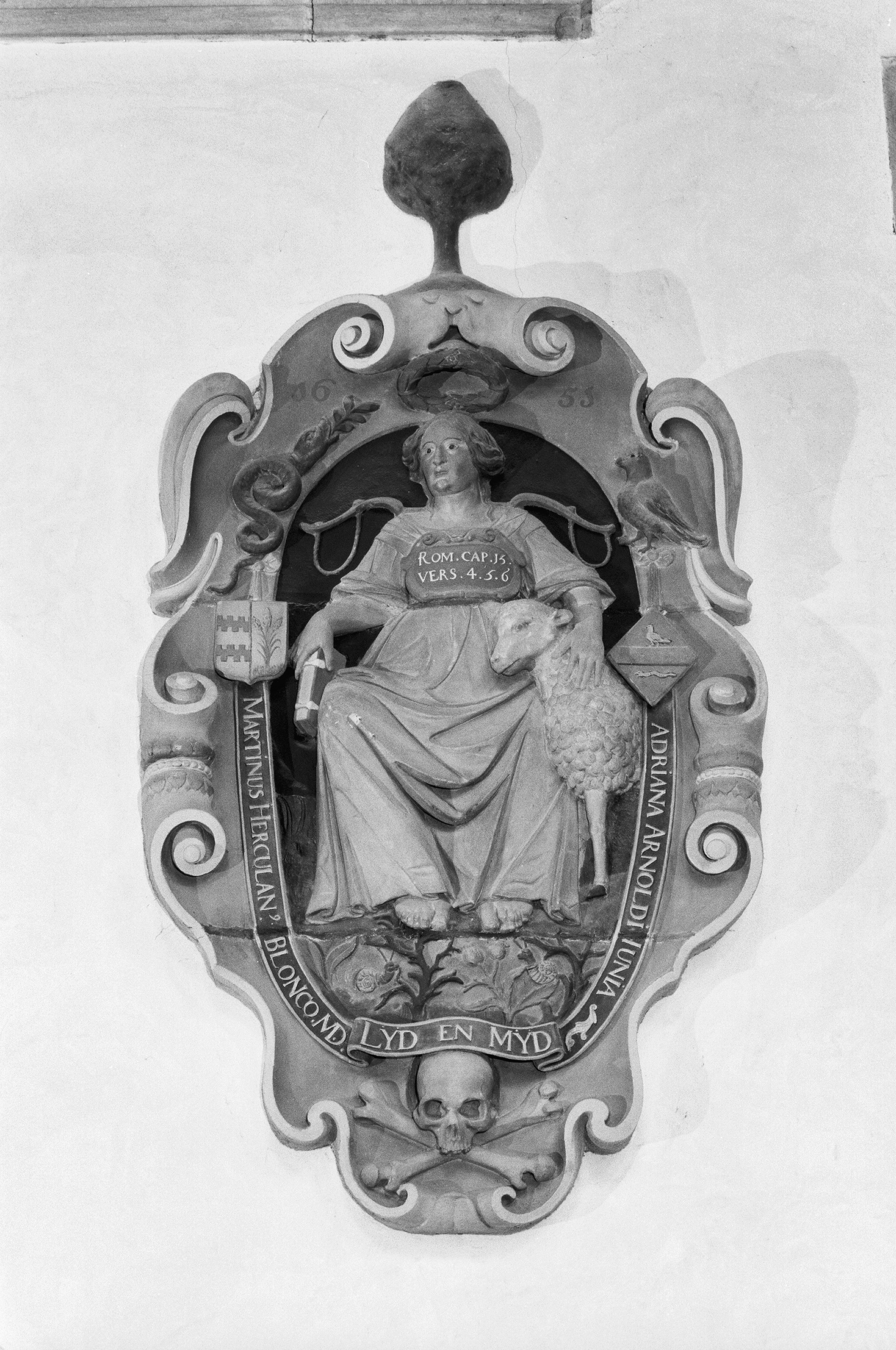 Sint Janskerk: Interieur, epitaaf Martinus Herculaneus Bloncq; in de kooromgang, eerste travee zuidzijde